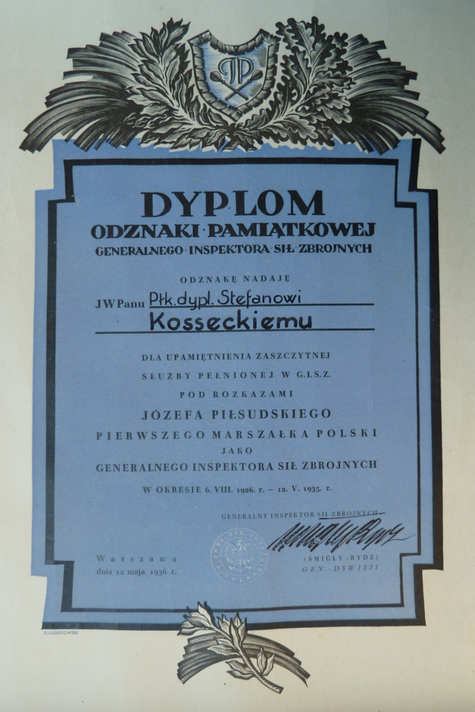 Dyplom Odznaki Pamiątkowej Generalnego Inspektora Sił Zbrojnych nadanej płk dypl. Stefanowi Kosseckiemu 12 maja 1936 r.